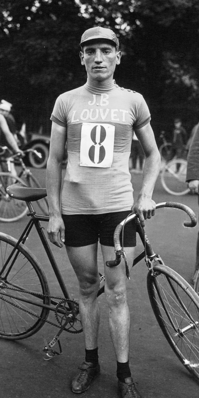 Longchamps : Charles Lacquehay (portrait à 2 m 50) : [photographie de presse] / Agence Meurisse